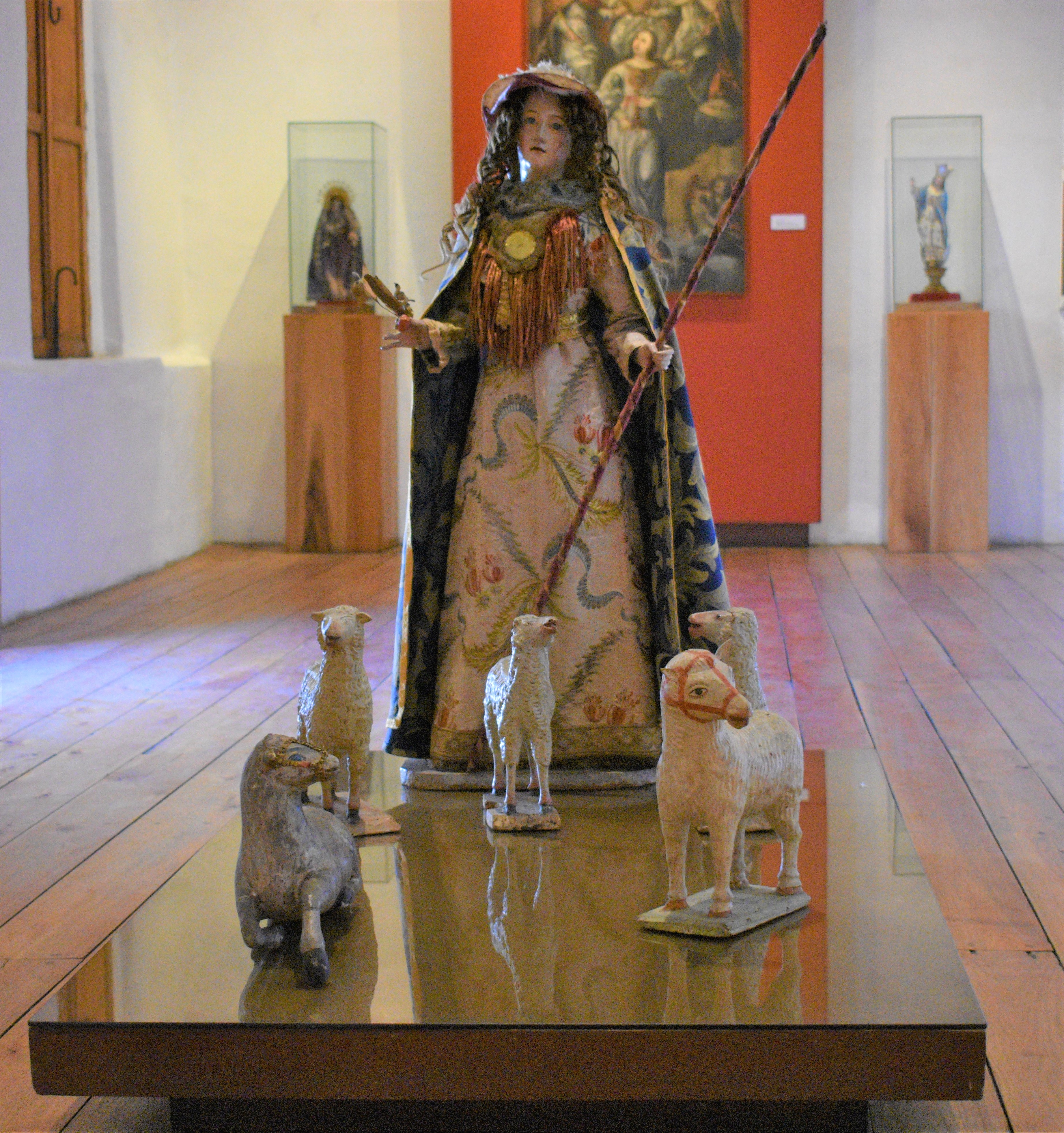 Escultura